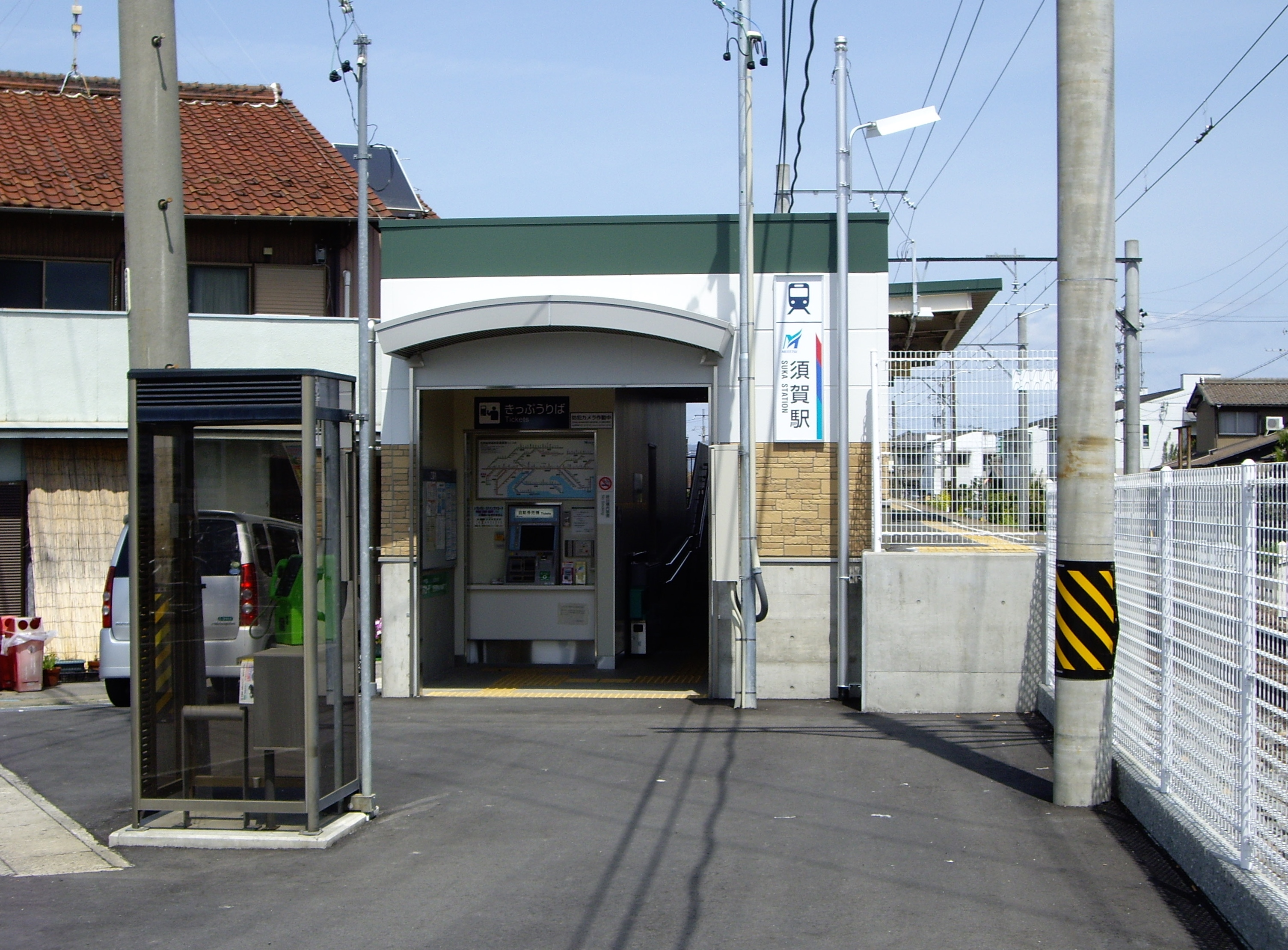 Suka Station(須賀駅)